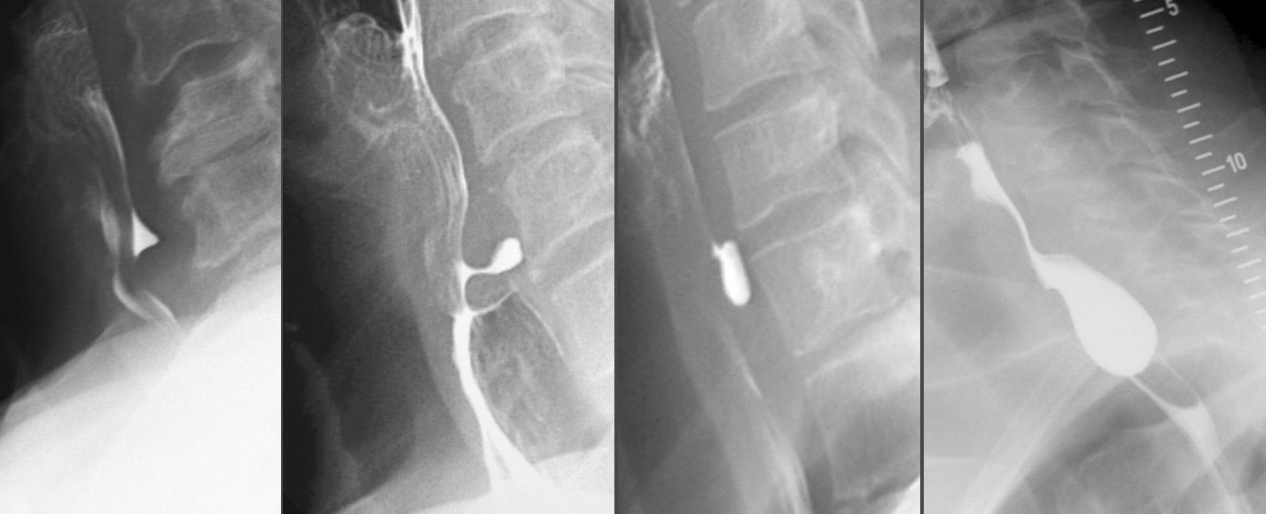 Stadien des Zenkerdivertikels von Brombart 1 bis 4.